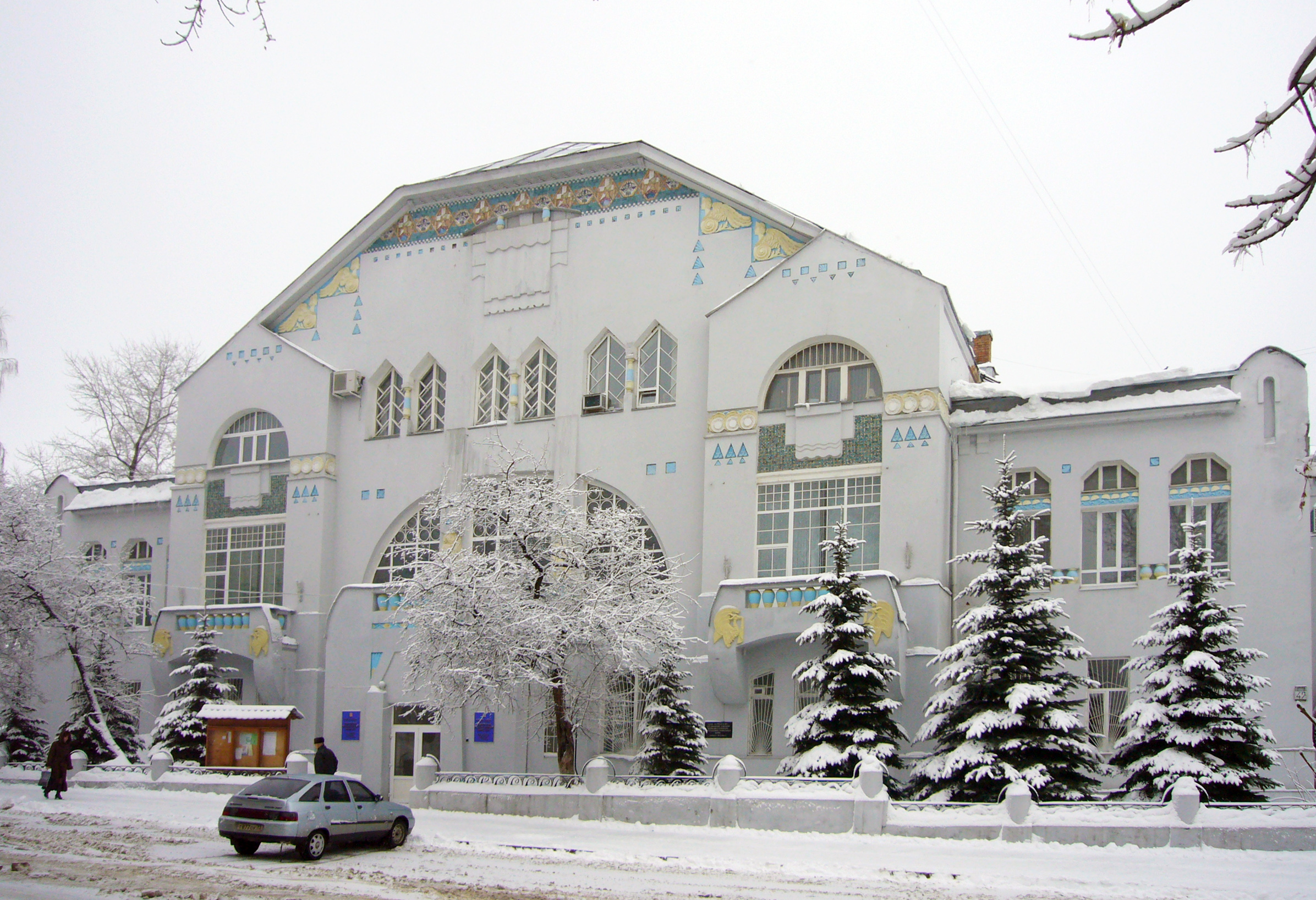 Симбирское отделение государственных Крестьянского поземельного и Дворянского земельных банков. Архитектор Ф.О. Ливчак. 1911 г